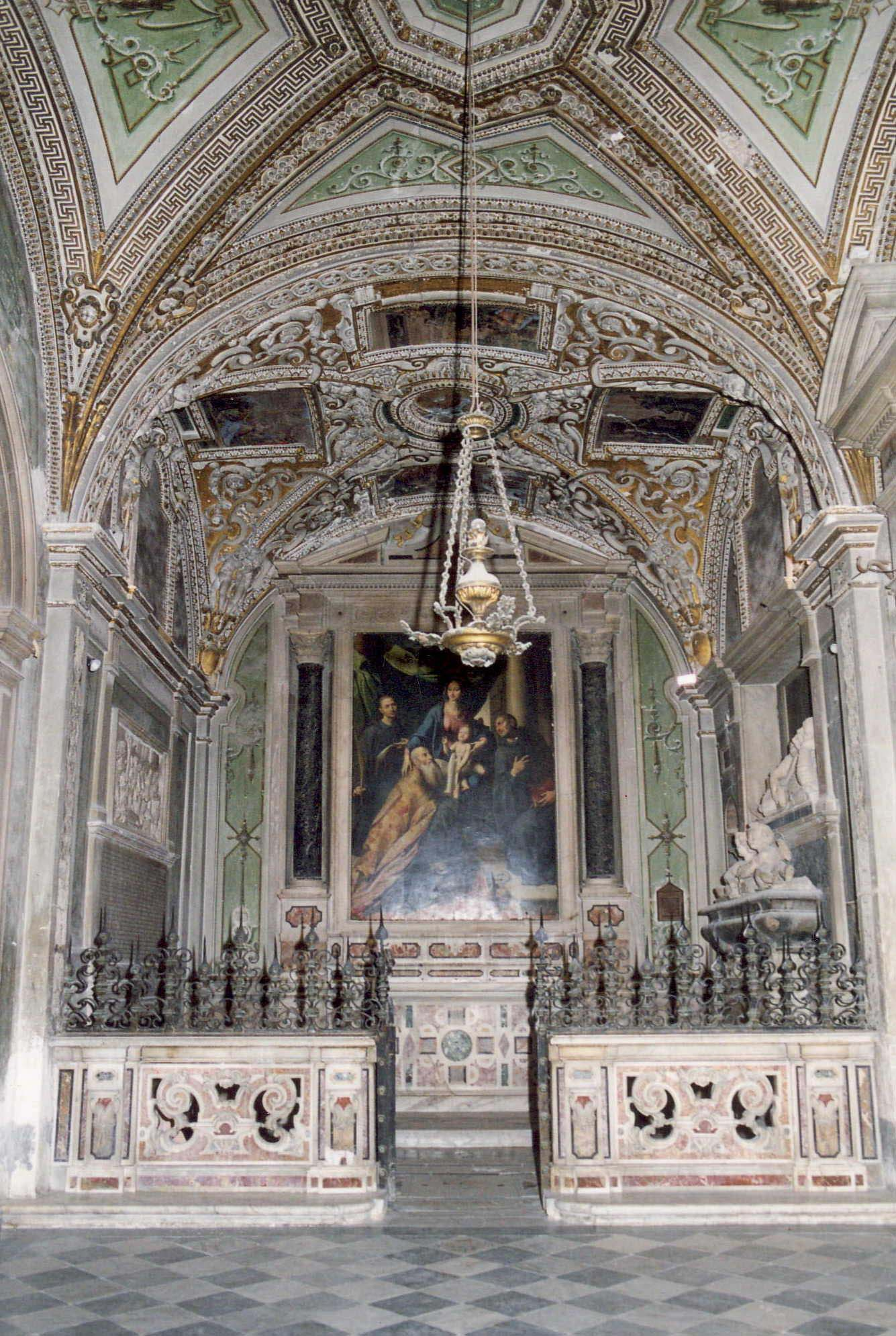 Napoli, Chiesa dei Santi Severino e Sossio, cappella Medici di Gragnano, 1590-1600; Madonna con Bambino e Santi di Fabrizio Santafede